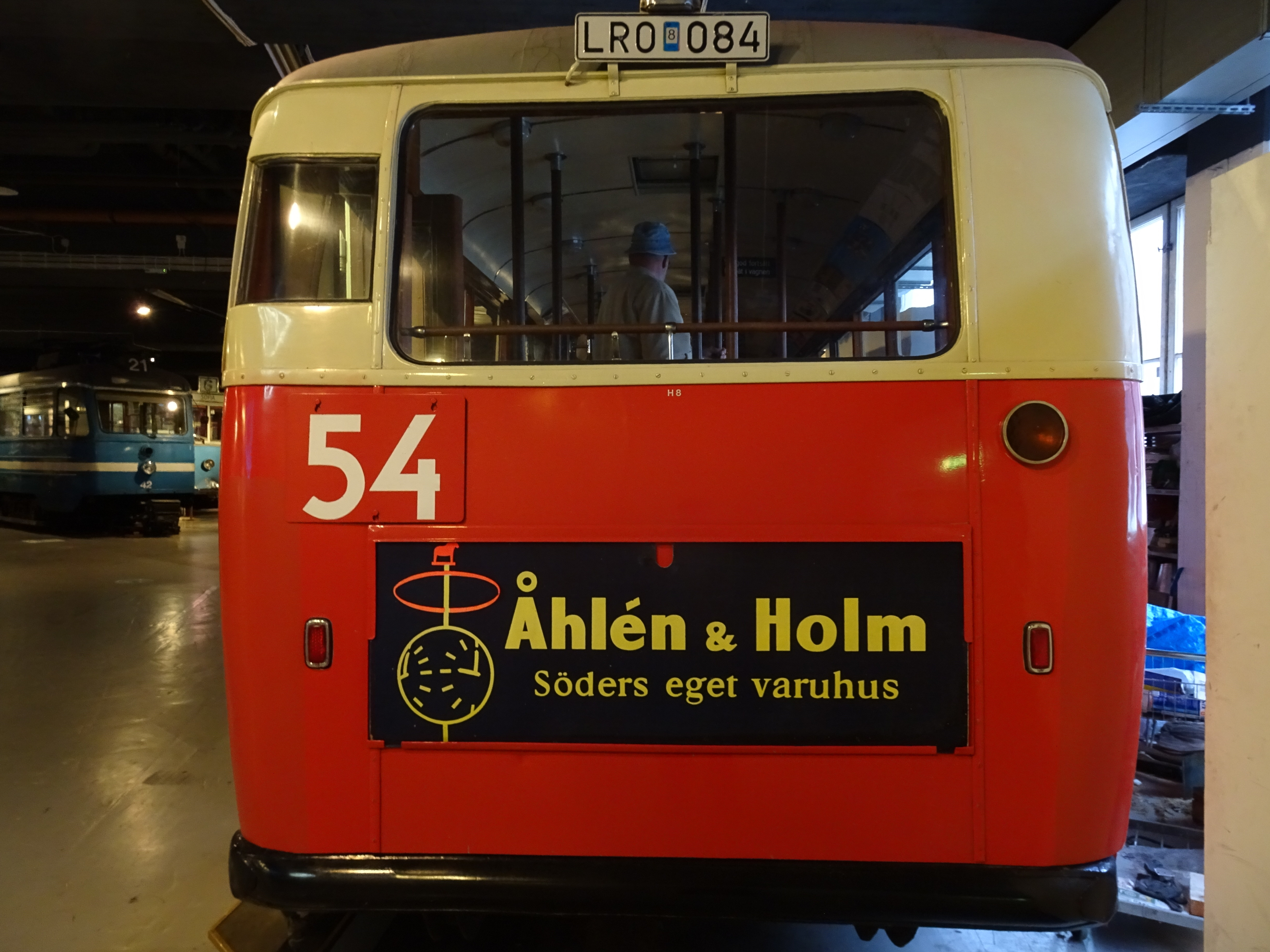 Åhlén Holm bussreklam från 1940-tal (Spårvägsmuseet)